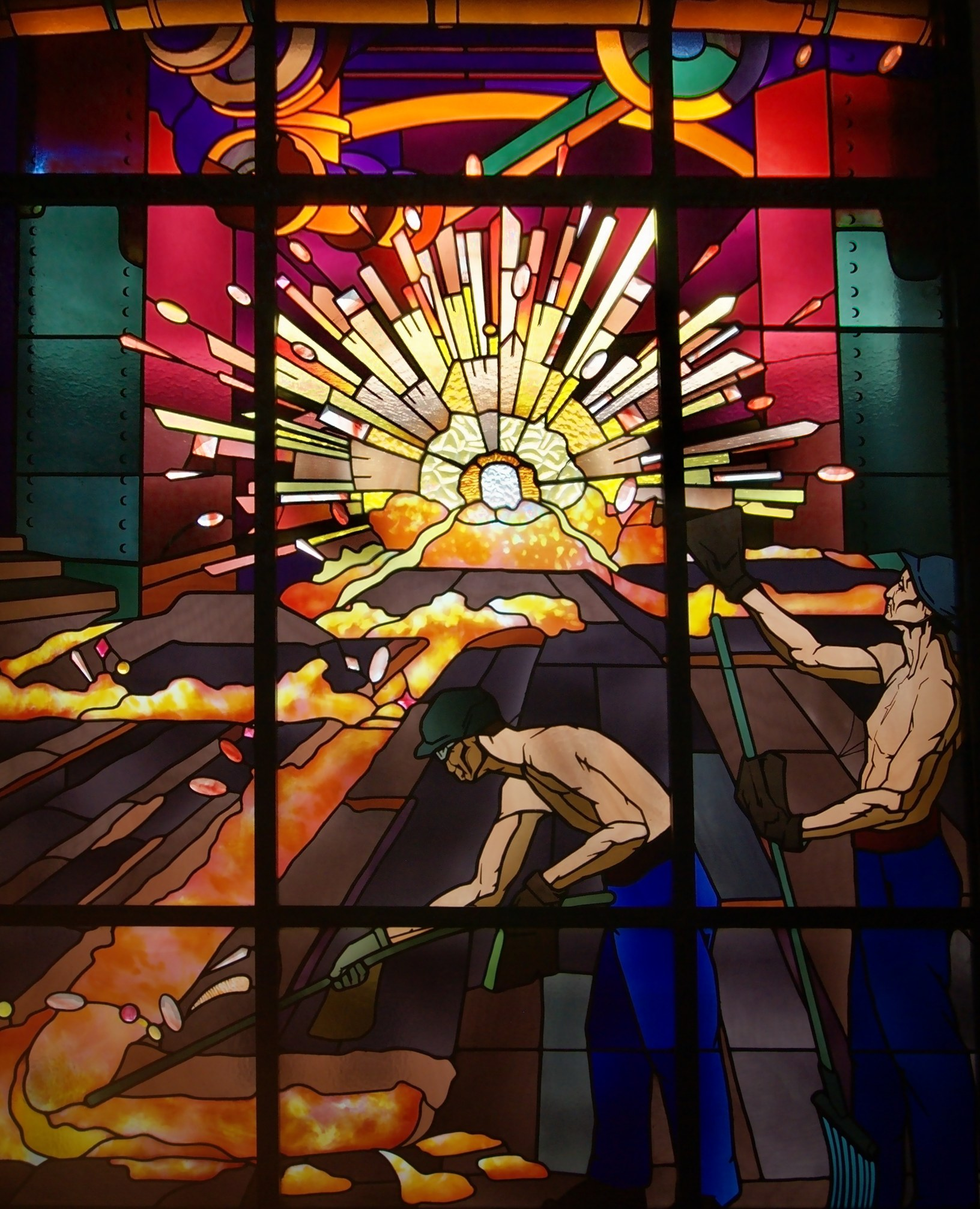 Situés à la maison de la Formation de Longlaville (anciennement Grands Bureaux des Aciéries de Longwy), ces vitraux exceptionnels de style Art Déco (1928) se répartissent sur 4 étages en 27 verrières qui retracent les métiers de la sidérurgie dans les années 20. Dessinés par Louis Majorelle, ils seront réalisés après sa mort.